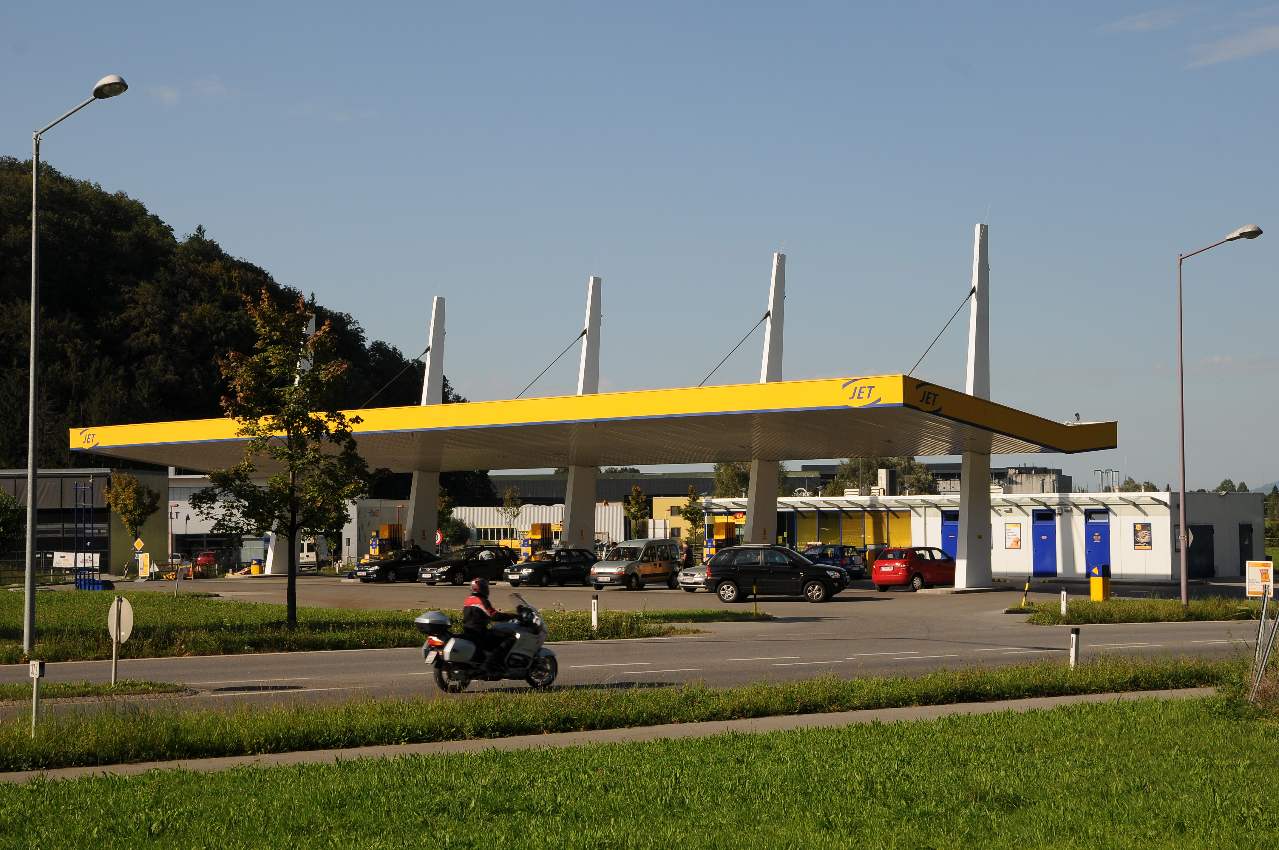 Tankstelle an der Lustenauerstraße Nr.2, am Kreisverkehr in Götzis. Info Das Objekt steht unter Denkmalschutz.